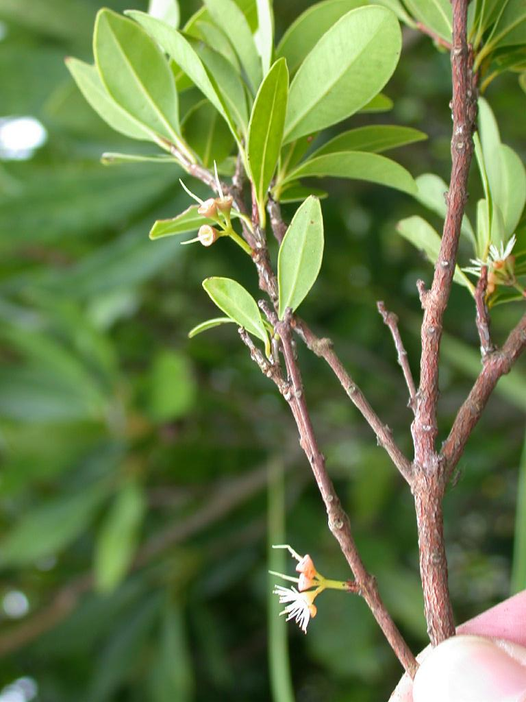 Syzygium buxifolium：アデク 2004/08/11 沖縄本島北部：Okinawa Island, Japan